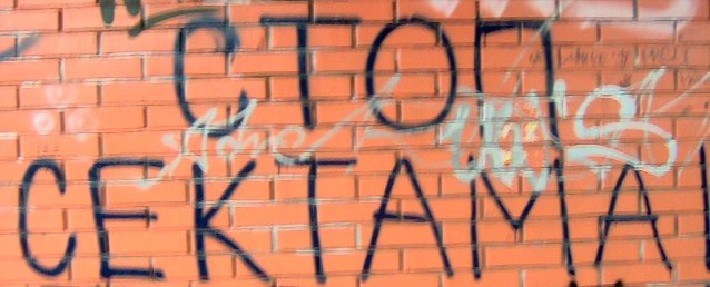 Grafit "Stop sektama" u podzemnom prolazu na Terazijama. "Stop sektama" je naziv akcije "Obraza" kojom vrše potiskivanje malih verskih zajednica u korist vladajuće religije.